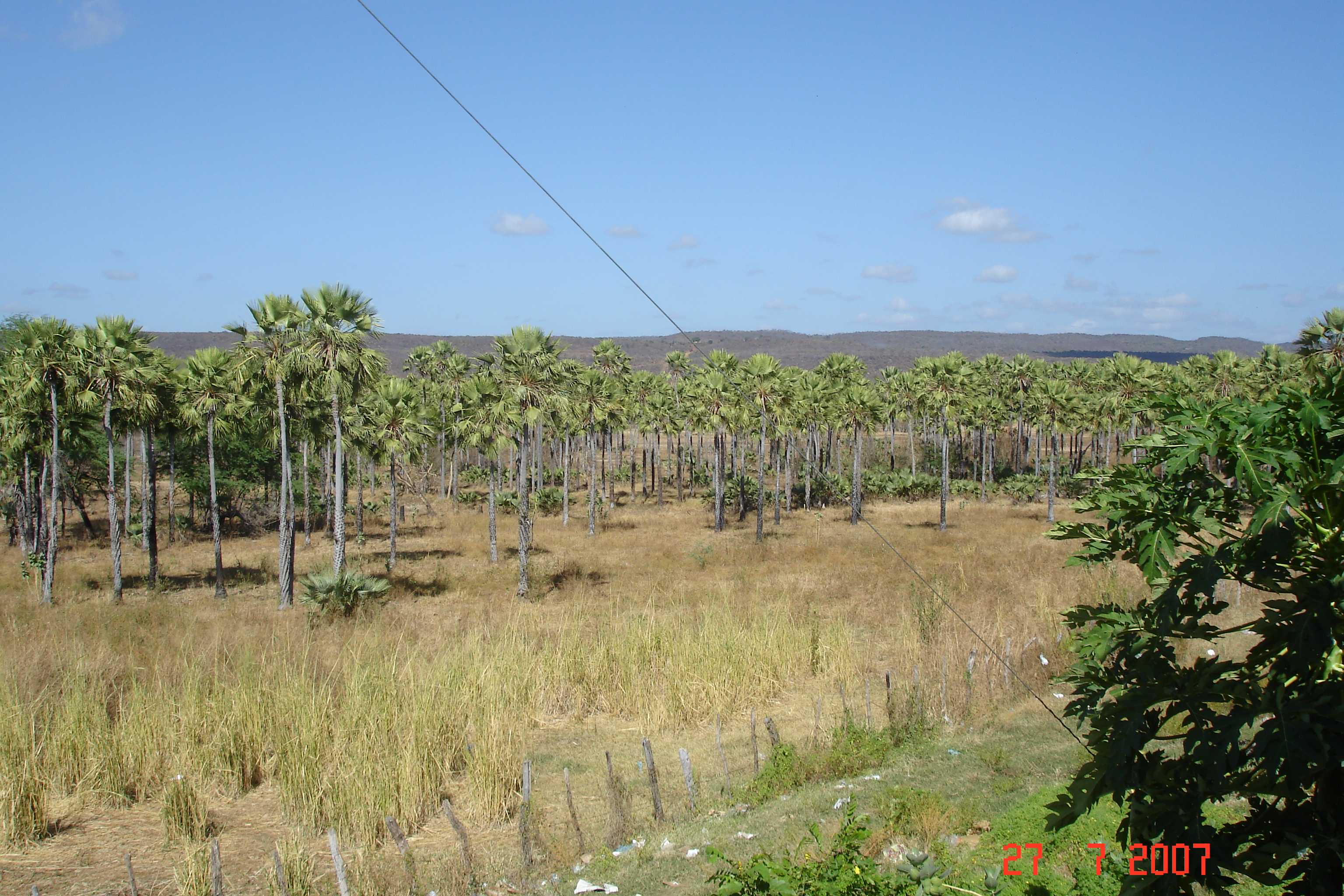 Vista de carnaubeiras, conhecida como árvore da vida, pois oferece uma infinidade de usos ao homem; planta nativia da qual é extraida a matéria prima para a fabricação de vários produtos: a cera de carnaúba é um insumo valioso que entra na composição de diversos produtos industriais como cosméticos, cápsulas de remédios, componentes eletrônicos, produtos alimentícios, ceras polidoras e revestimentosw:pt:São Miguel do Tapuio Piauí, Brasil